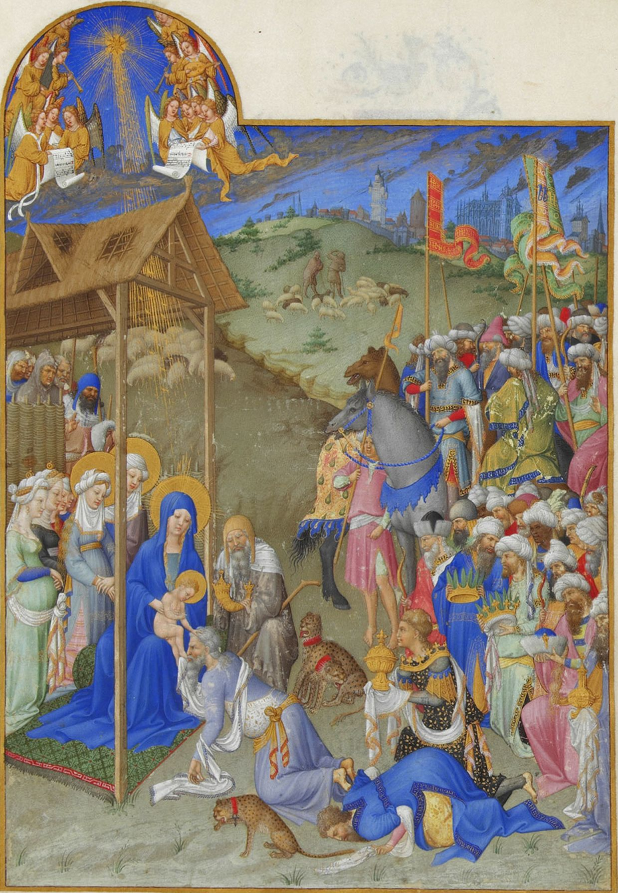 À droite de la miniature sont représentés les rois mages ainsi que leur suite. Ayant enlevé leur couronne, les trois rois sont prosternés : l'un — Melchior — baise les pieds du Christ, le deuxième — Balthasar — embrasse le sol, et le troisième — Gaspard — porte son présent. En même temps que les mages sont représentés, les bergers sont eux-aussi en adoration devant l'Enfant Jésus. Ils sont présents l'un à côté de la Vierge, les autres derrière la crèche, leurs moutons paissant sur les collines à l'arrière. La Vierge est entourée de femmes habillées en costumes à la mode du début du XVe siècle. La ville à l'arrière, censée représenter Bethléem, reprend peut-être l'apparence de la ville de Bourges.